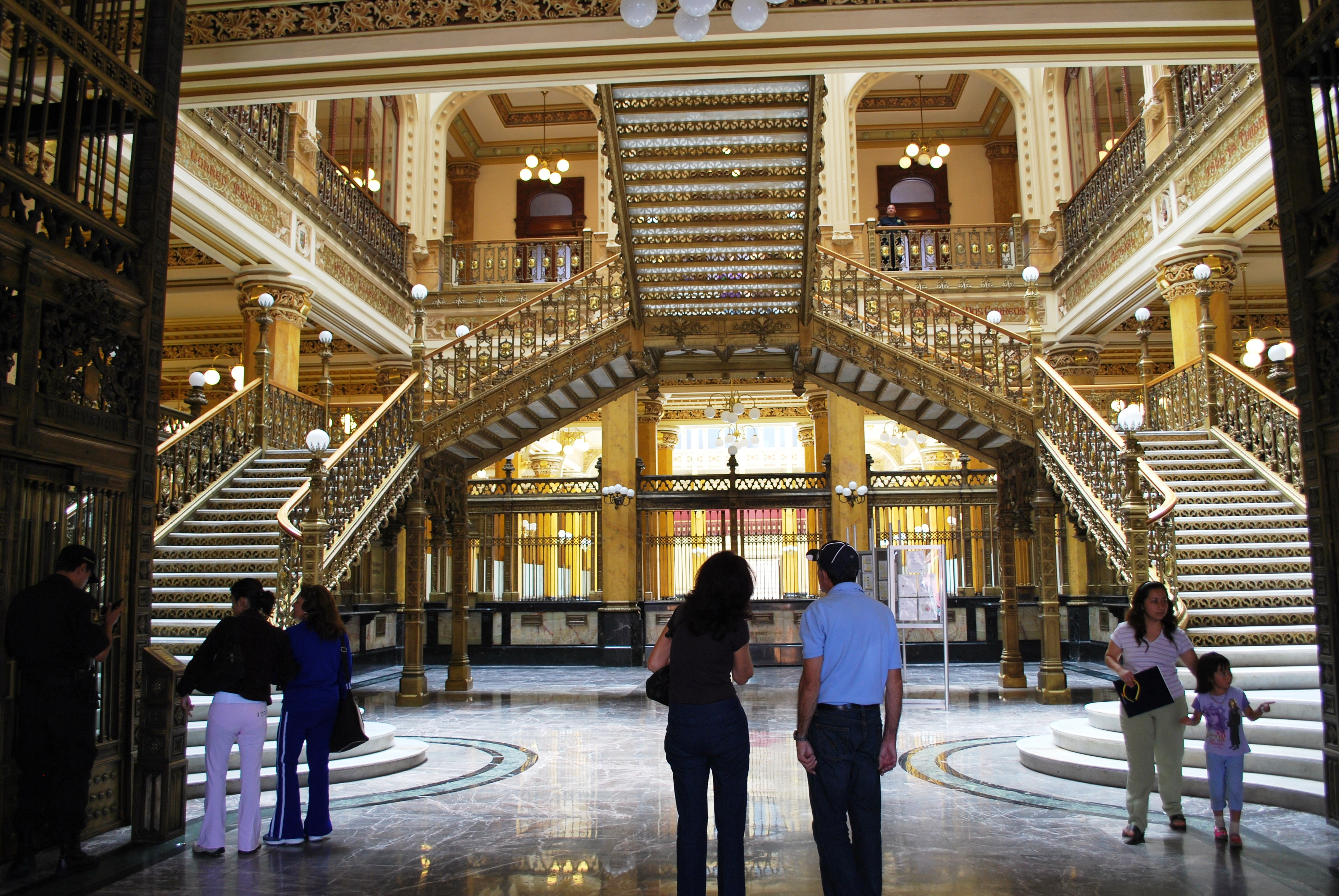 ESCALERAS DEL PALACIO POSTAL